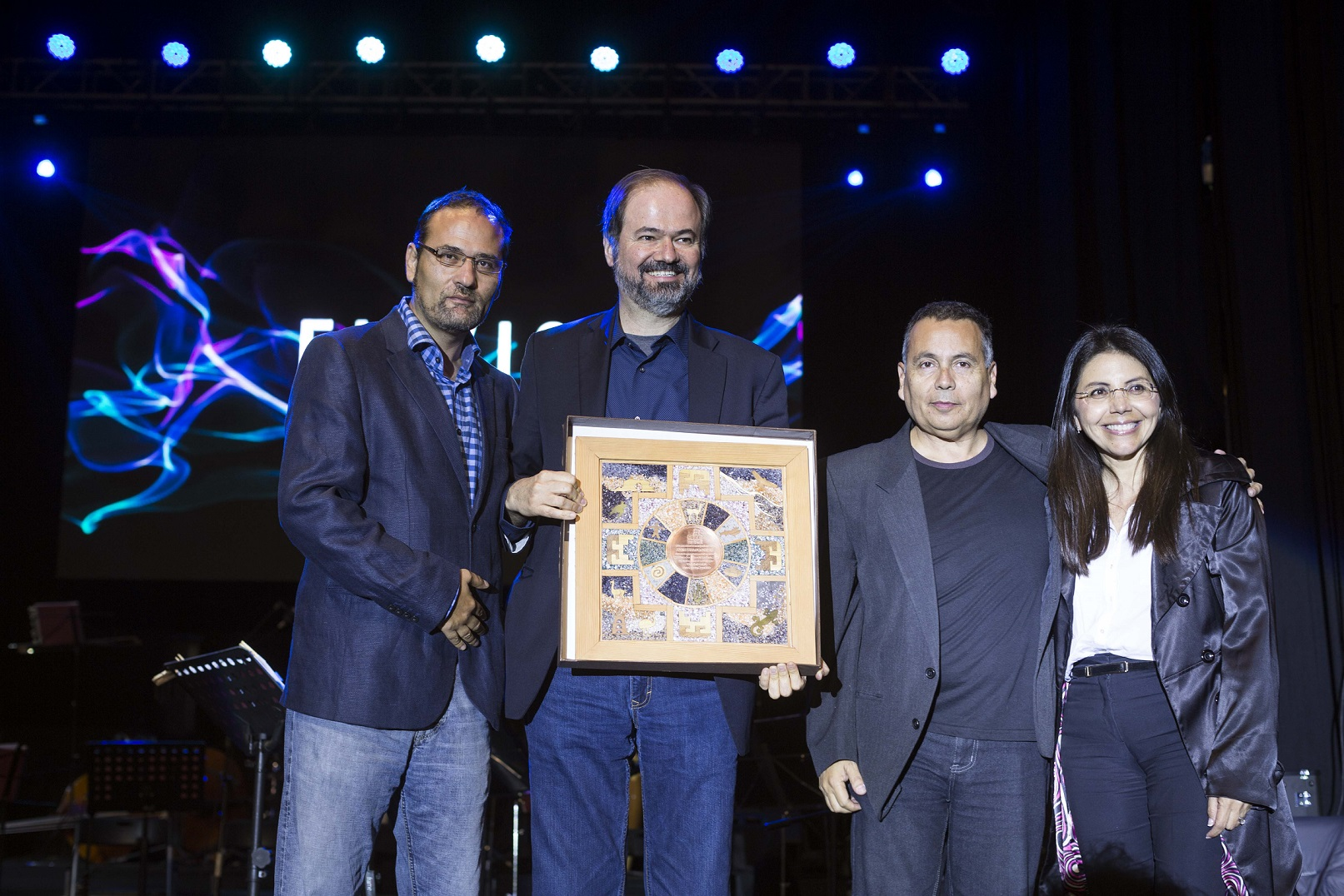 Patricio Rojas, Presidente Corporación PAR, y Patricio Maturana, Productor Ejecutivo Filzic 2016, entregan premio al escritor, ensayista, y periodista mexicano Juan Villoro